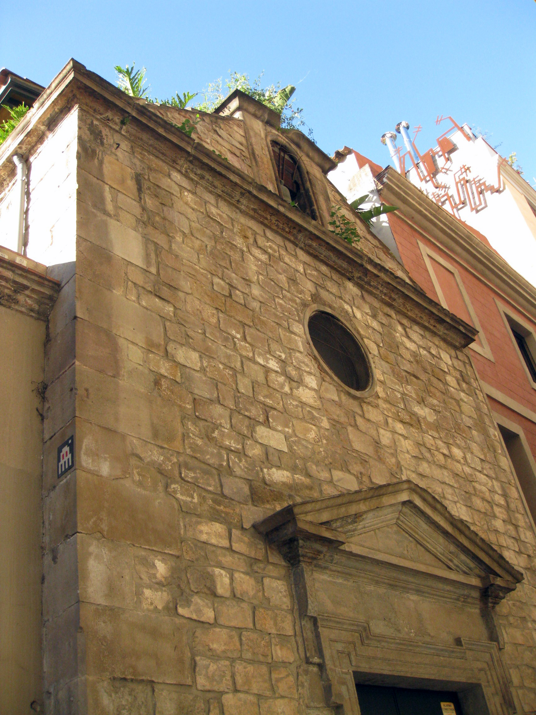 Antiga capella de la Casa dels Infants Orfes (1680), a la cantonada del carrers Elisabets amb la plaça dels Àngels, al Raval de Barcelona. Actualment acull una de les dependències del CIDOB.